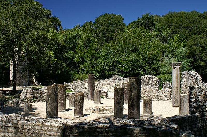 Butrint, Albania: baptistery